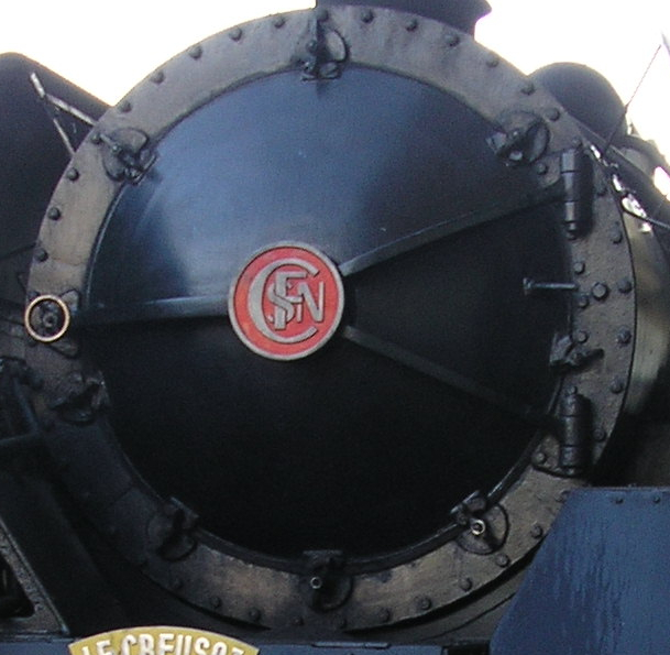 Porte de boîte à fumée de type unifiée dérivée de la type NORD